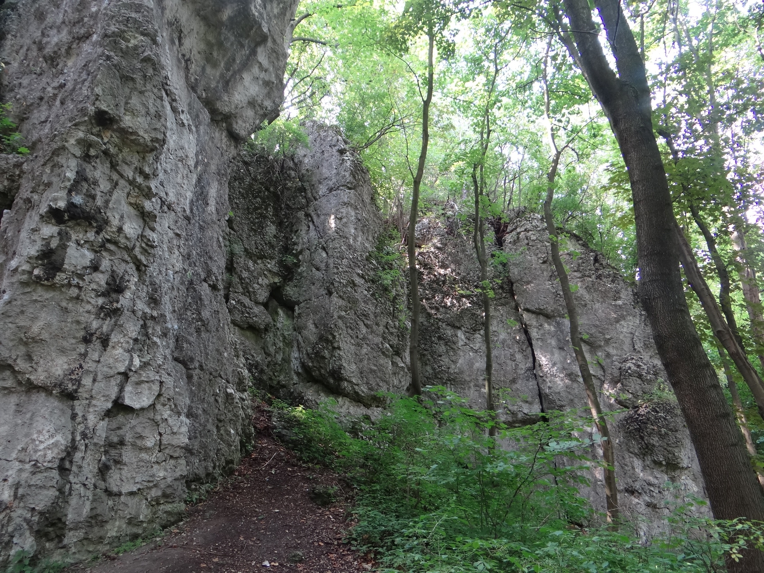 Grupa skał Jęzory w Paskowych Dołach w Sułoszowej